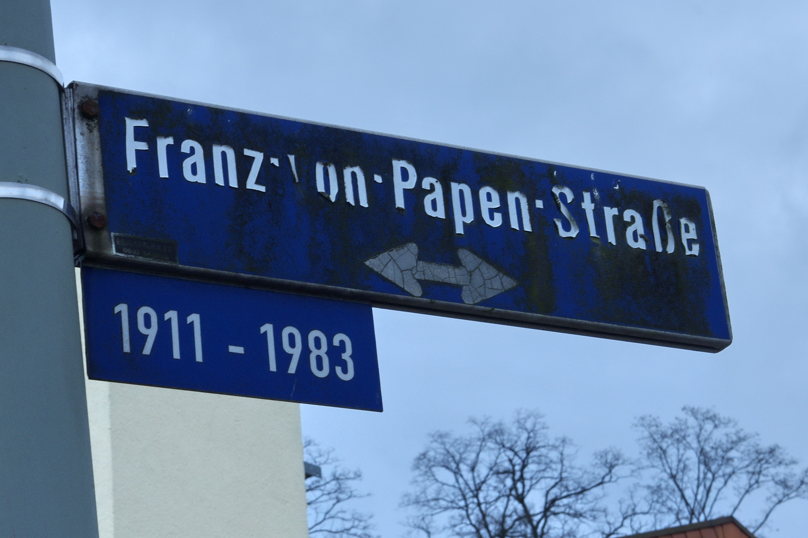 Franz-Von-Papen-Straße in Wallerfangen, gewidmet Friedrich Franz ("Fränzchen") von Papen (* 15. Juli 1911; † 4. Januar 1983)